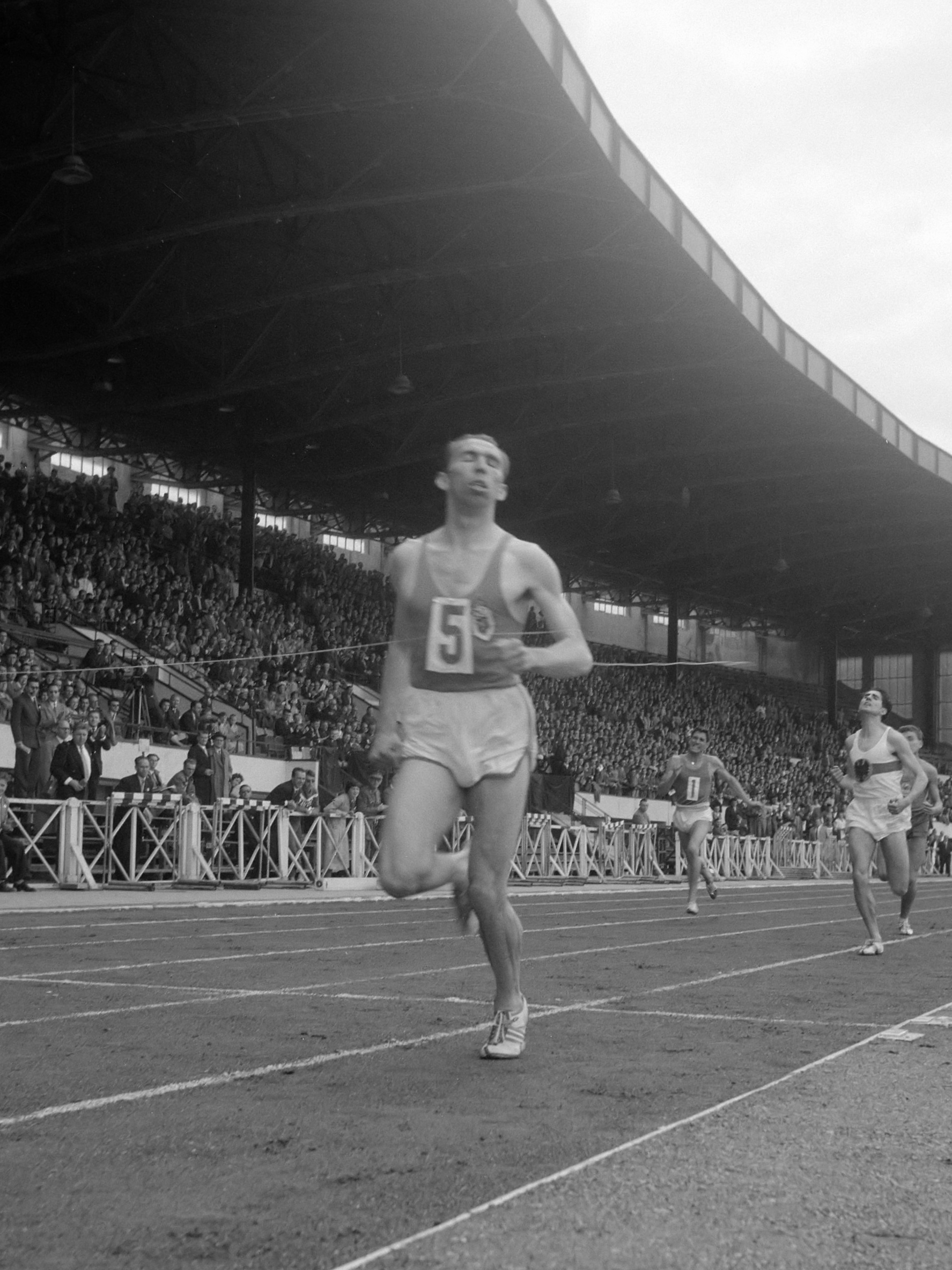 Atletiekwedstrijden in Brussel 10.000 meter. Finish 1.500 meter Roger Moens 28 juli 1957